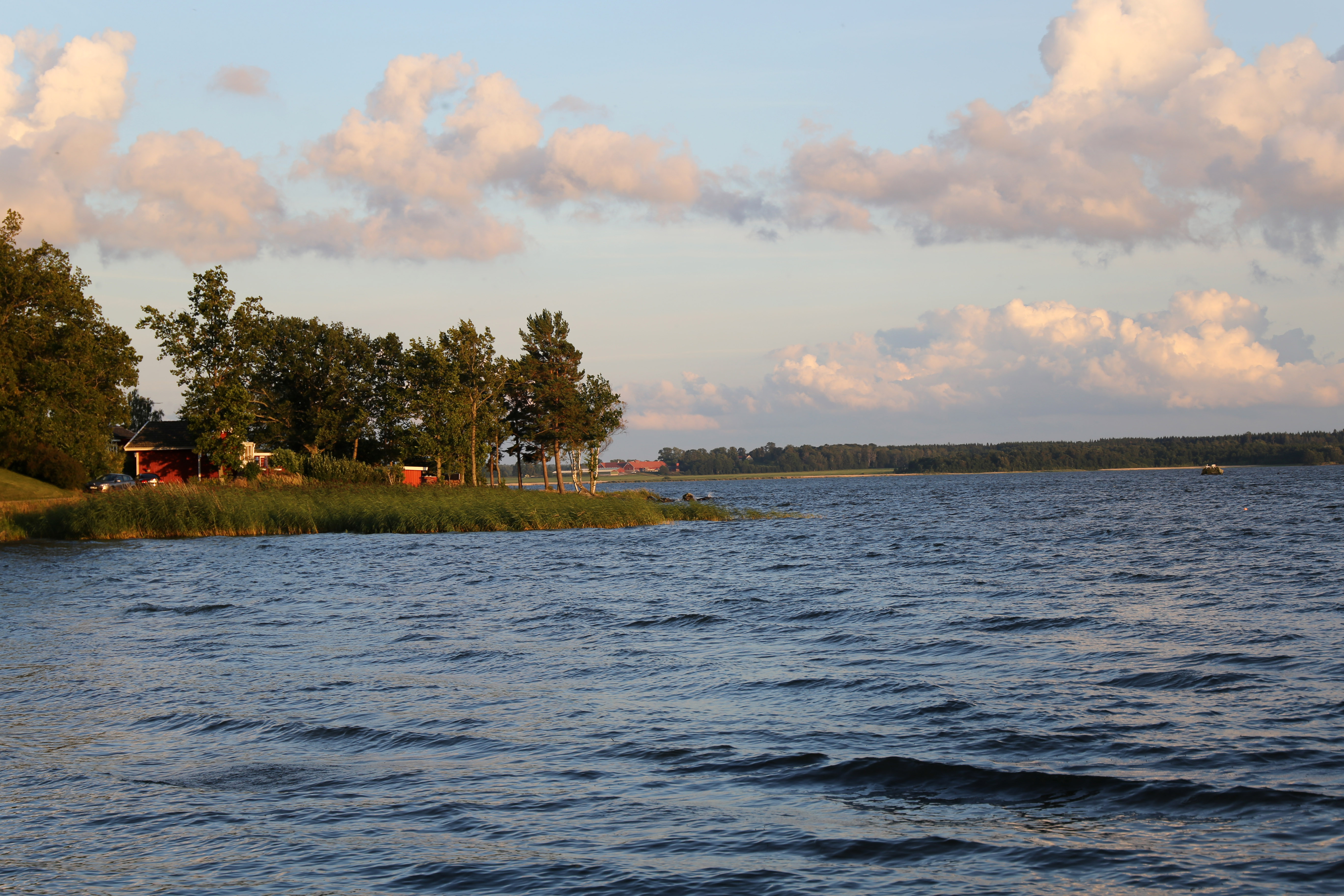 Vänernsee bei Torsö